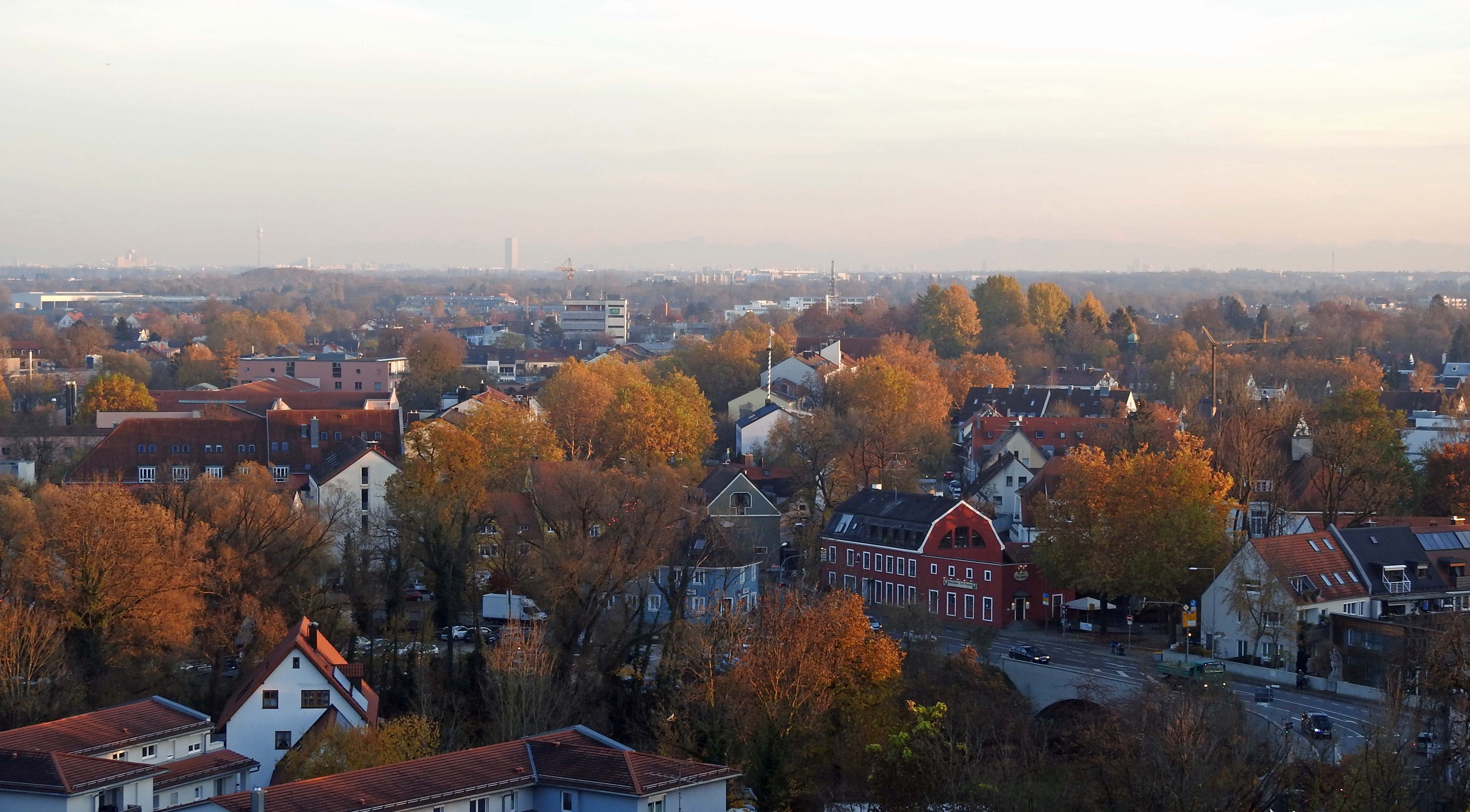 Blick vom Schloss auf Dachau